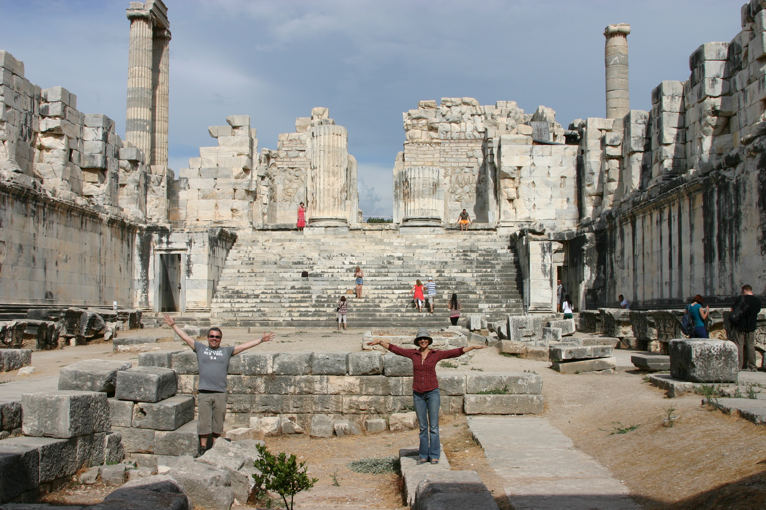 Vista do Templo de Apolo em Dídima